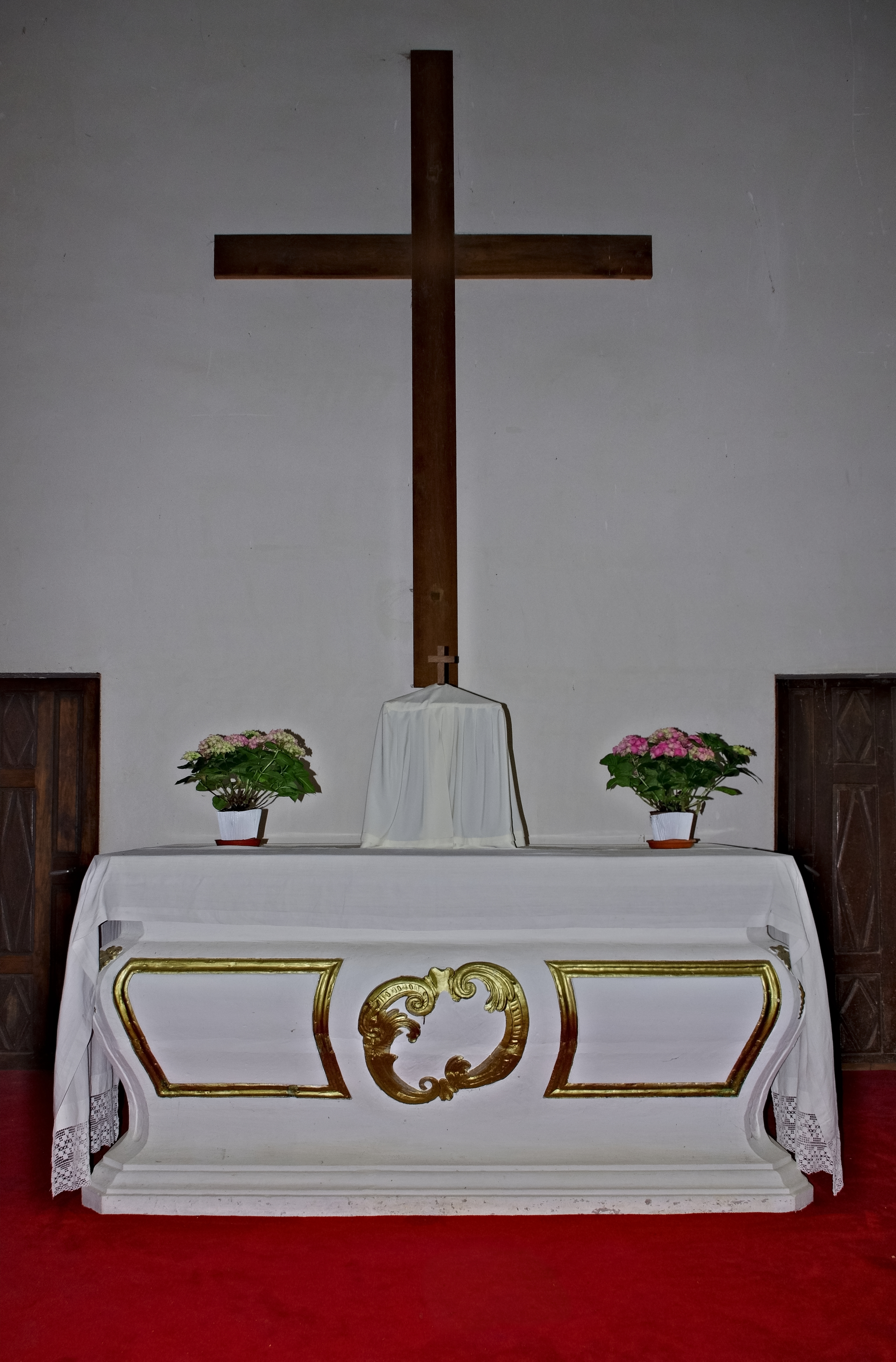 Autel XVIIIe, église Saint-Laurent de Romagne, Vienne, France.